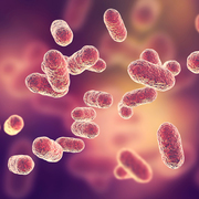 porphyromonas gingivalis